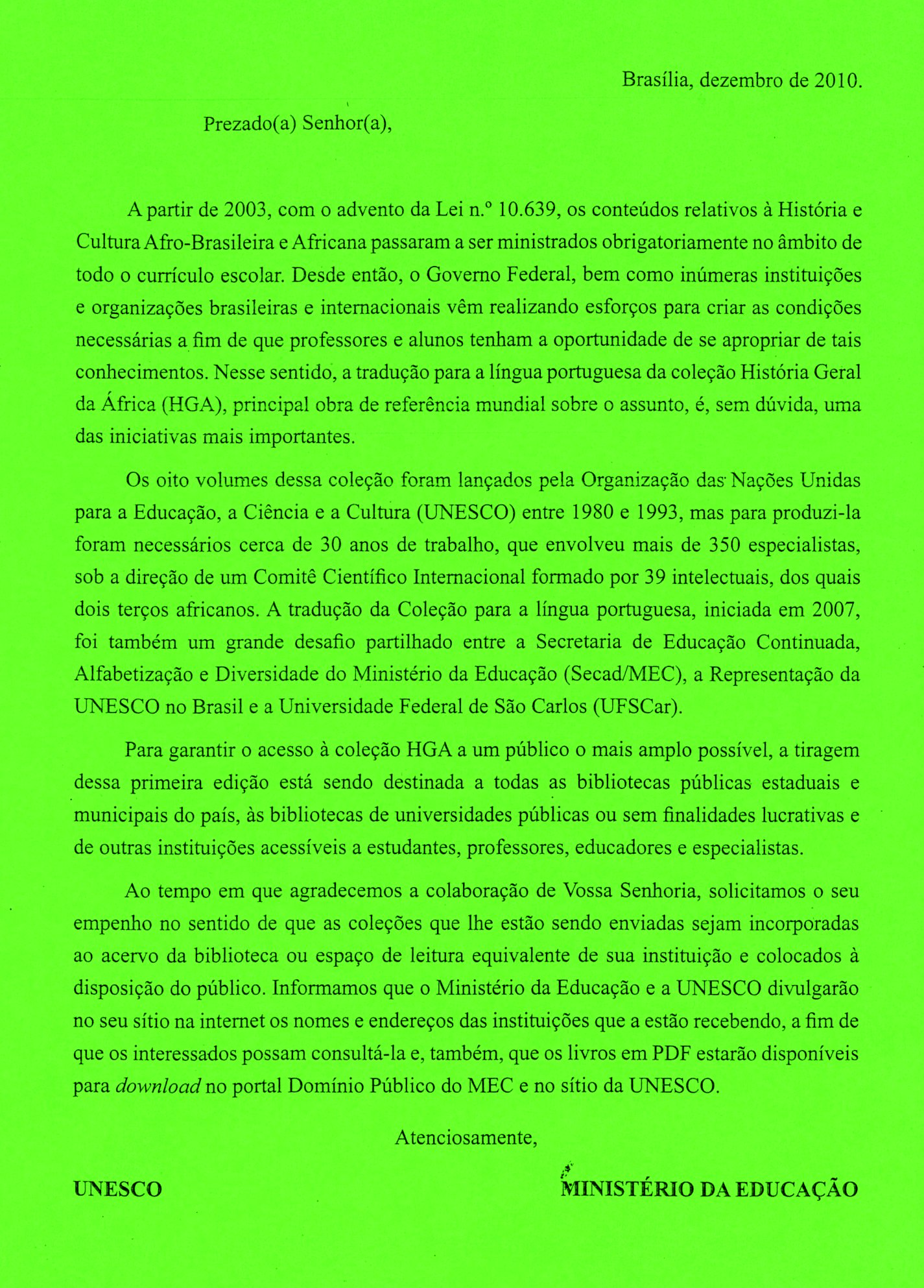 Carta do governo do Brasil apresentado a edição em língua portuguesa da coleção História Geral da África.